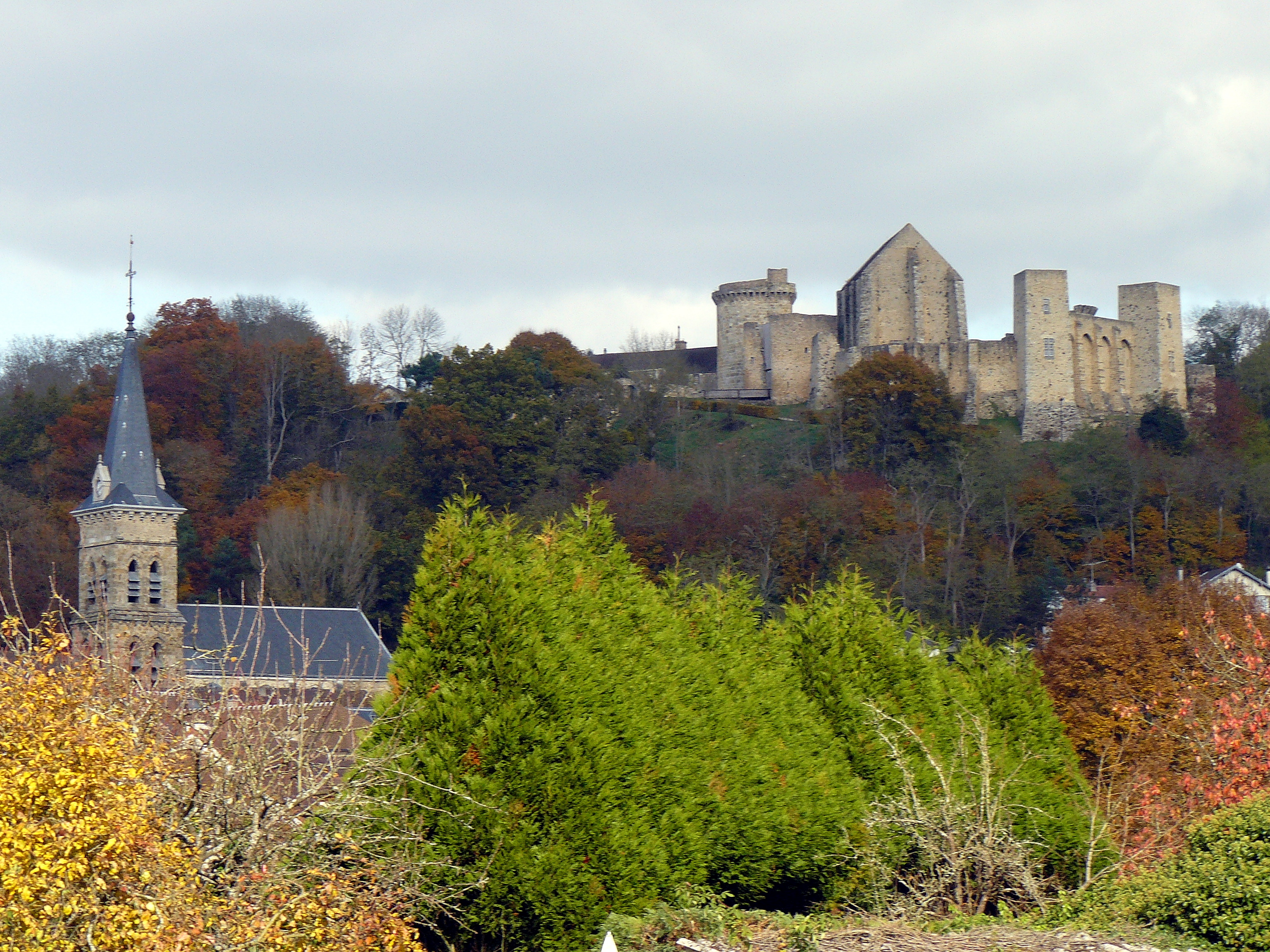 Chevreuse (Yvelines, France) : l'église St-Martin et le château de la Madeleine